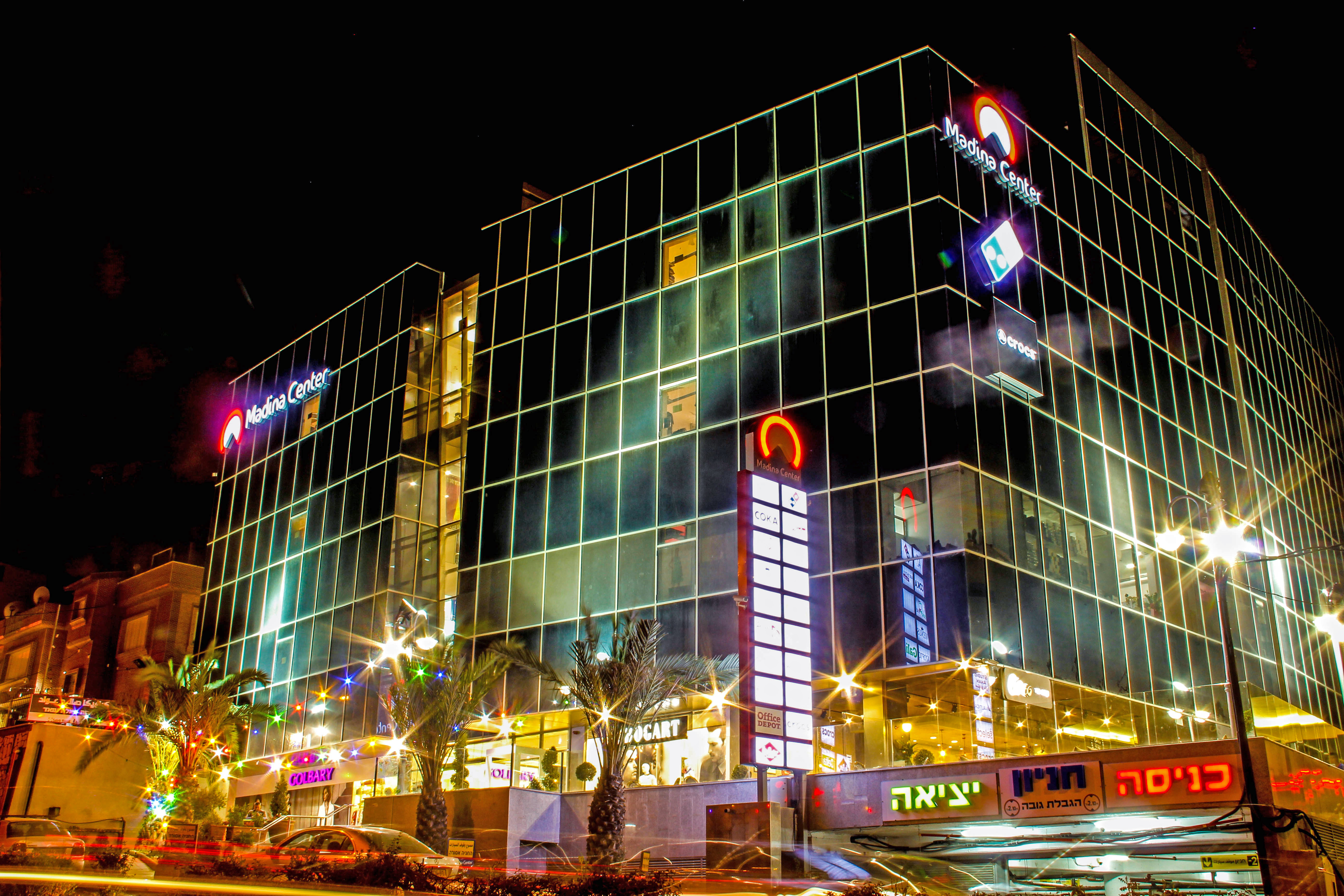 مجمع مدينة سنتر في مدينة أم الفحم